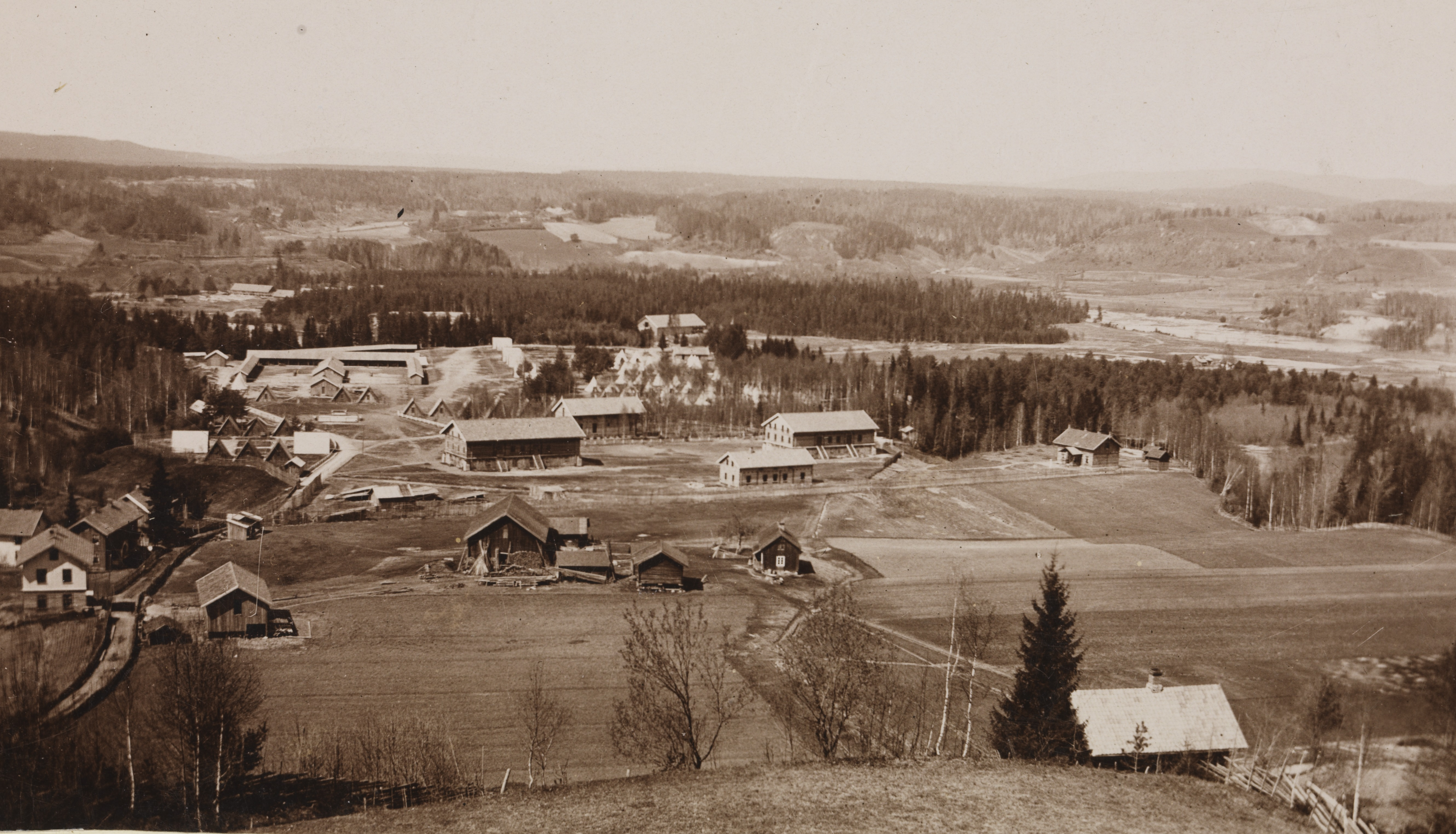 Hvalsmoen ekserserplass for Ingeniørregimentet (i Haugsbygd). Standkvarter for Ingeniørvåpenets skole- og øvningsavdeling og Forsvarets ABC- skole. Militærleir med telter sees i midten. Depicted place: Buskerud, Ringerike